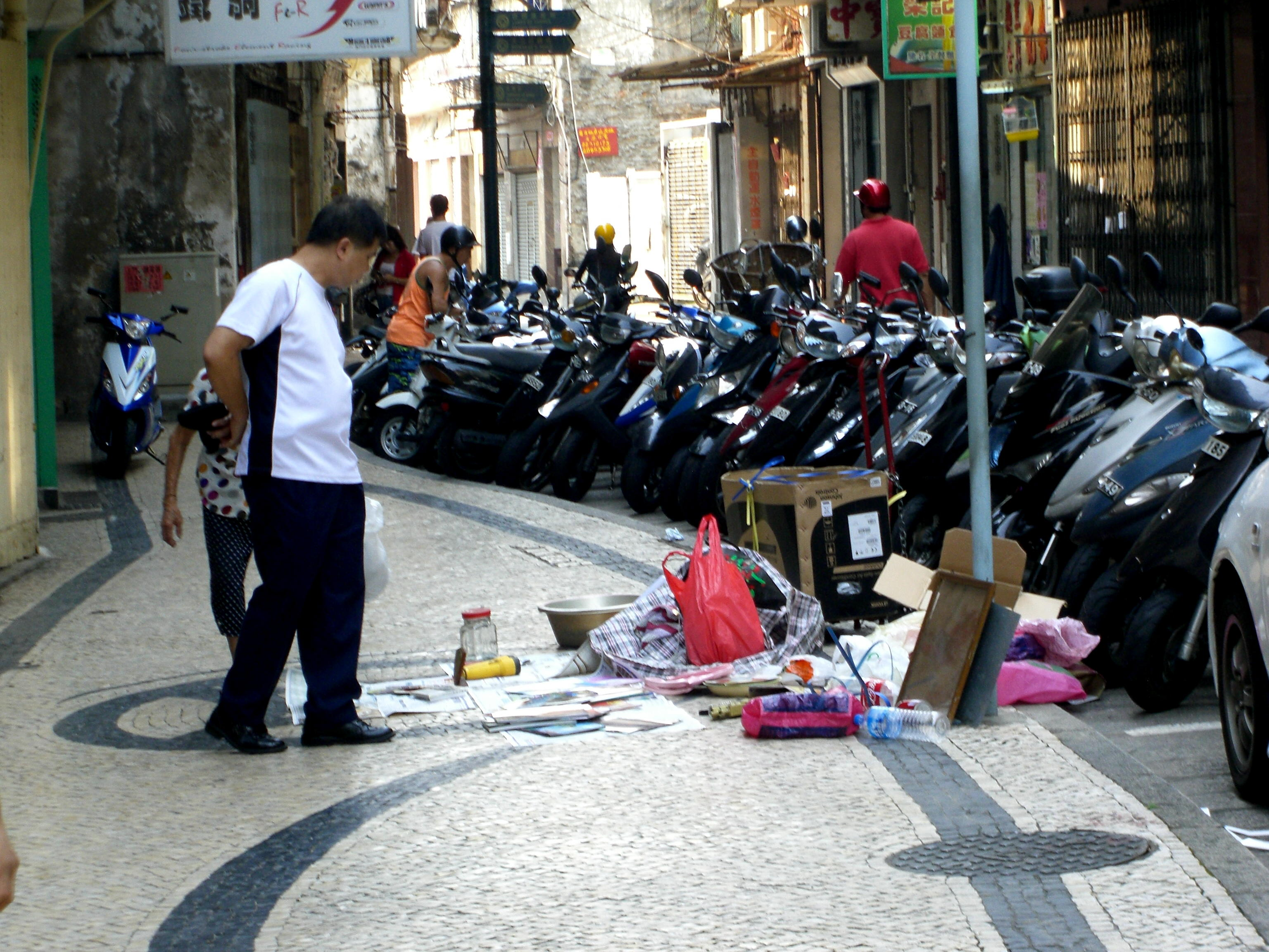 Rua da Tercena